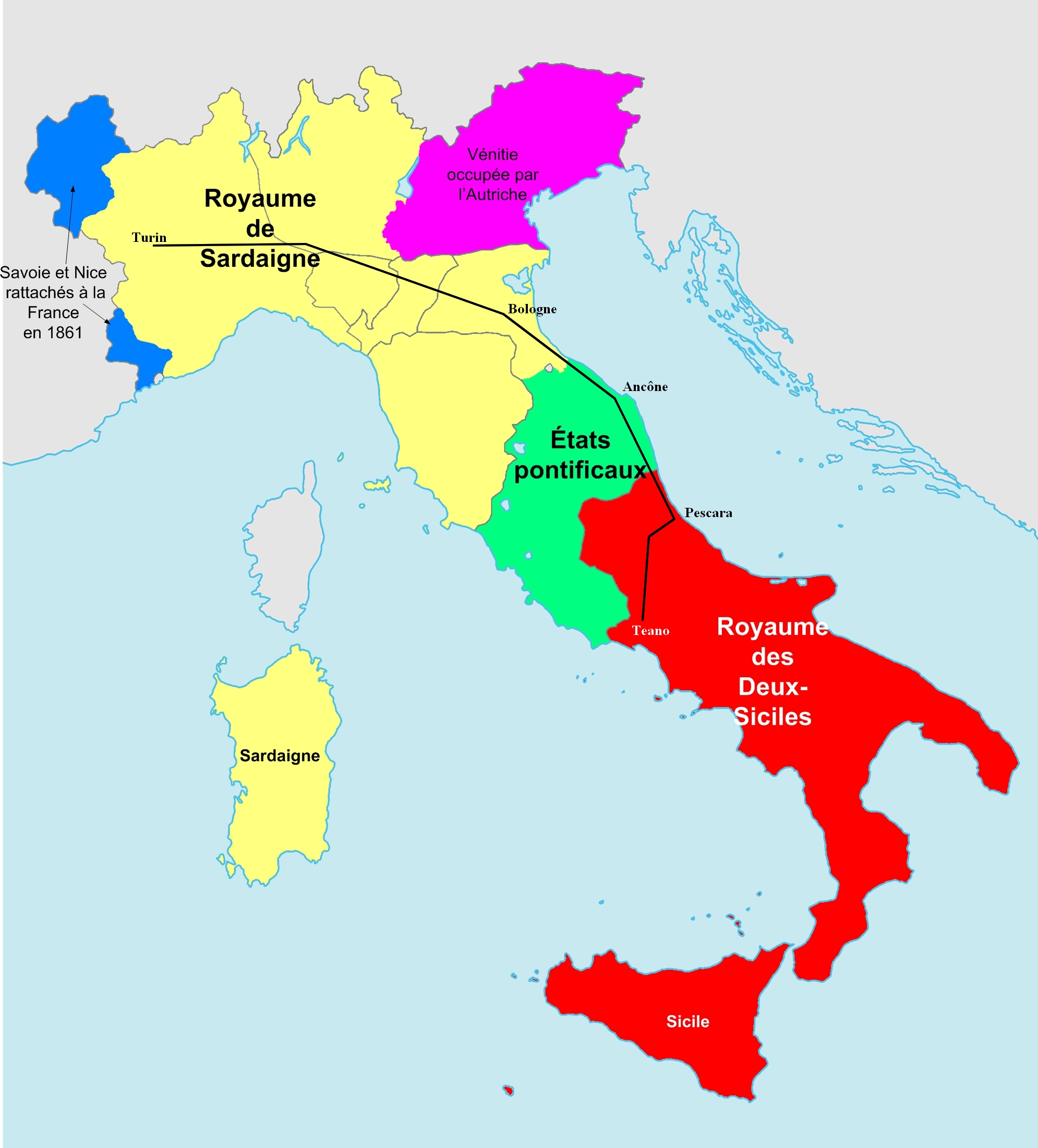 expédition de Fanti et Cialdini de septembre 1860